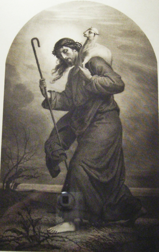 Guter Hirte von Joseph Kehren